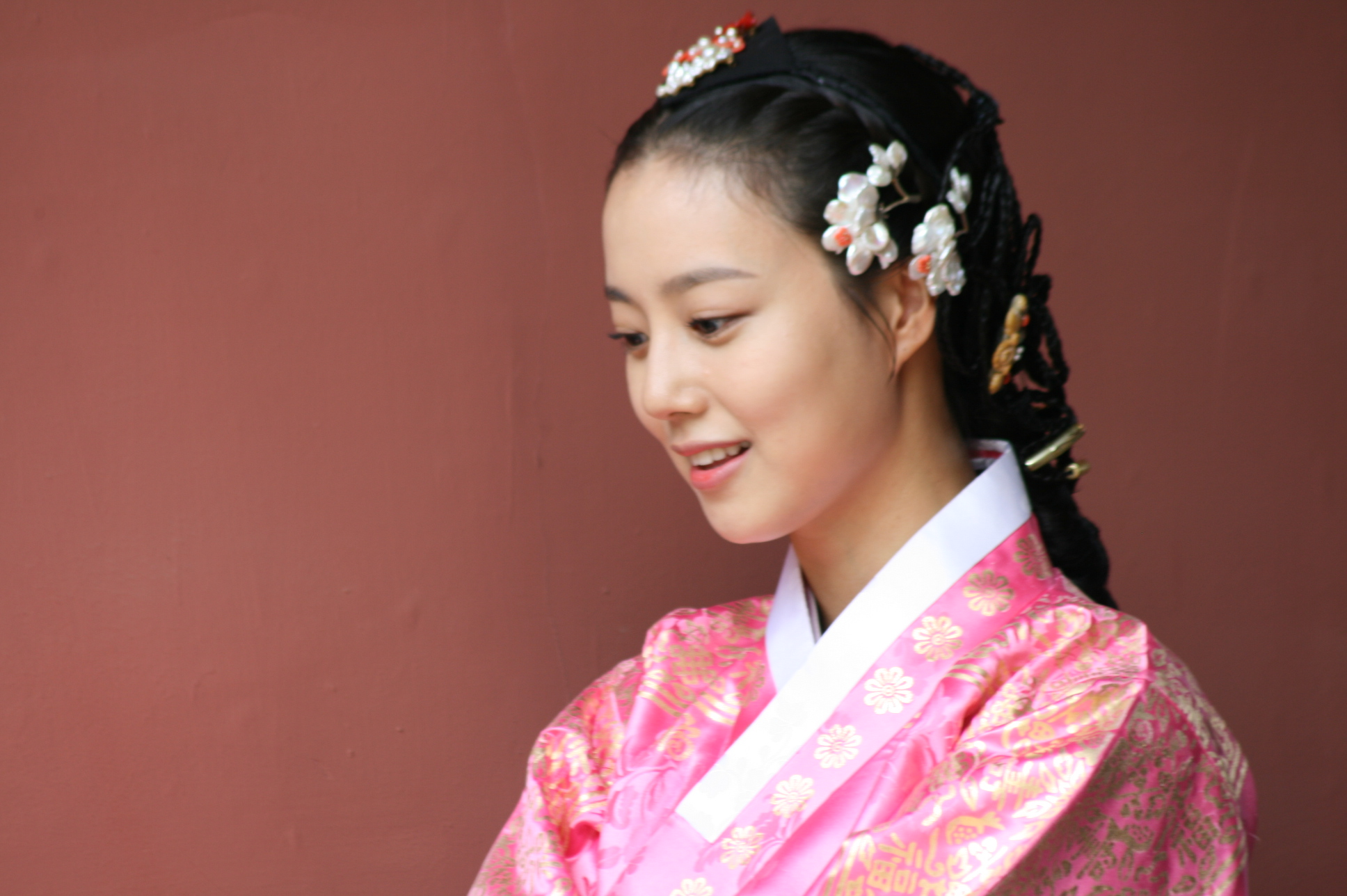 2011년 6월 28일 경복궁에서 진행된 KBS 수목드라마 《공주의 남자》 포스터 촬영.